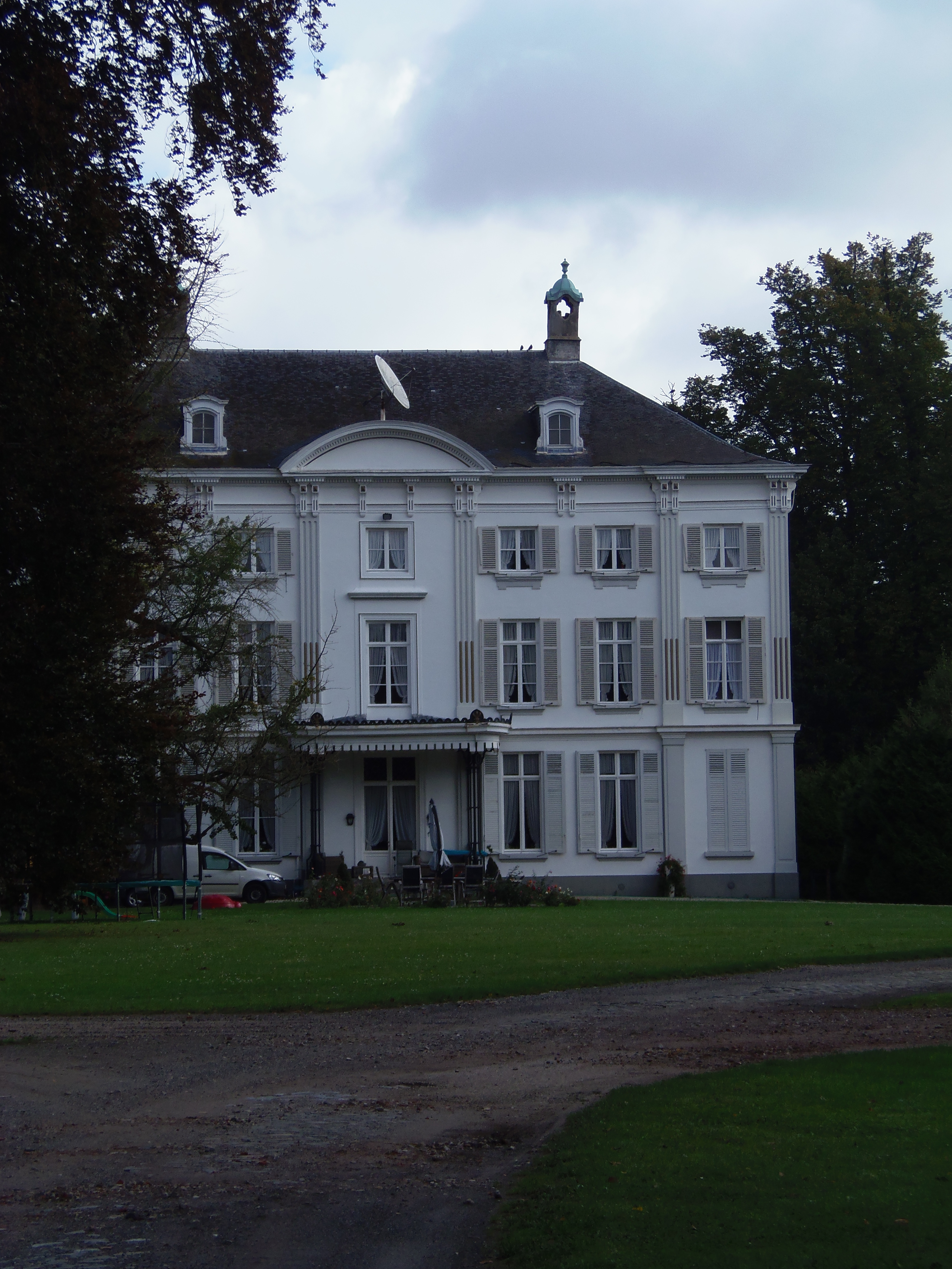 Kasteel Bouwelhof, Neoclassicistisch landhuis van circa 1820, Het Park 1, Bouwel (Grobbendonk)